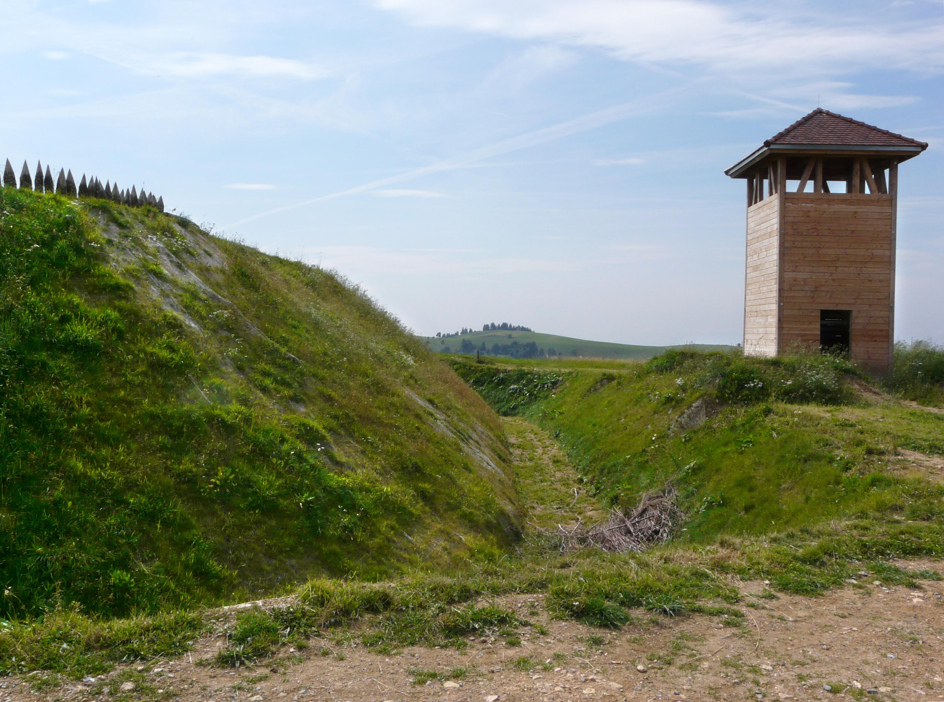 Rekonstruktion einer barocken Sechseckschanze mit Wachturm bei Gersbach, Südschwarzwald